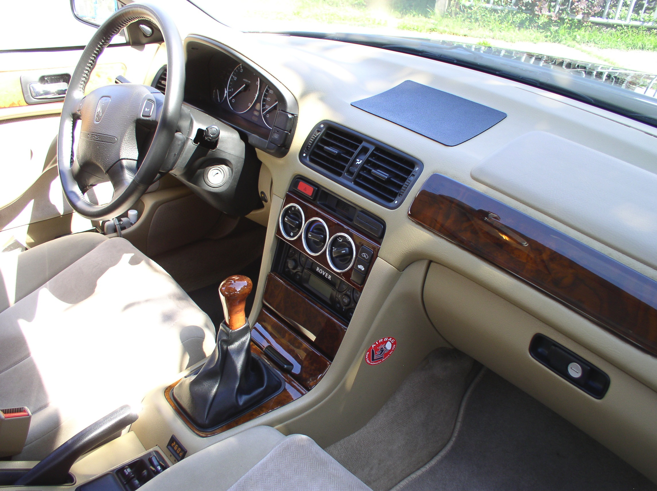 ROVER 620i Interior